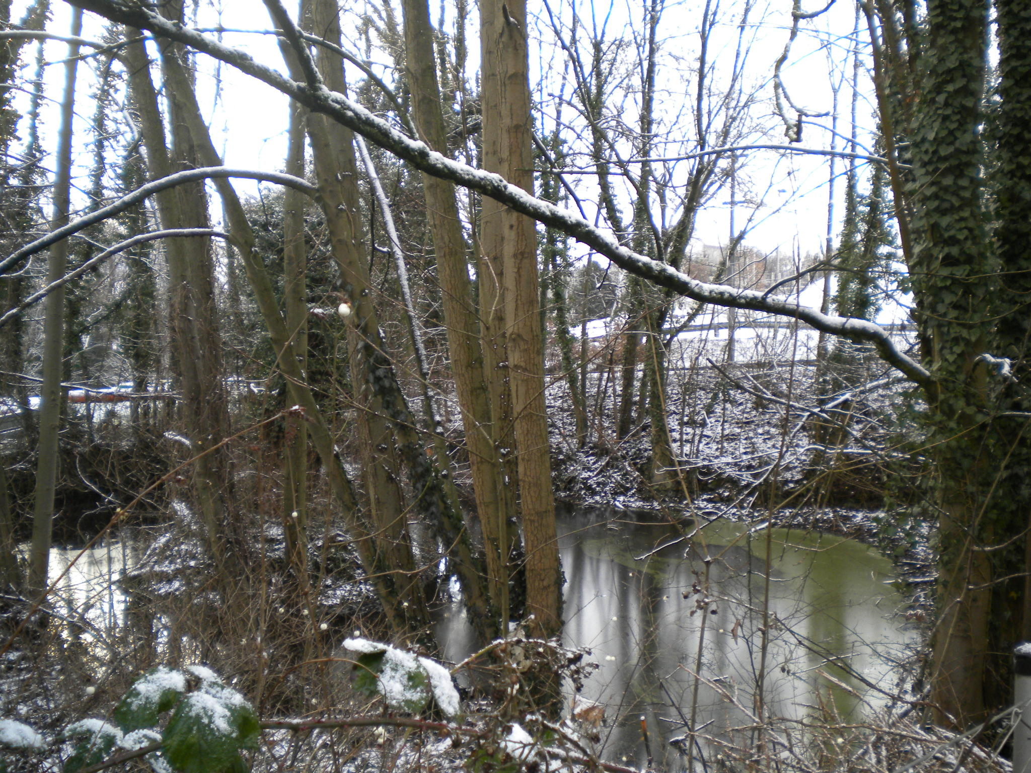 Der Teich des Schlosses Hagen heute, Linz, Österreich